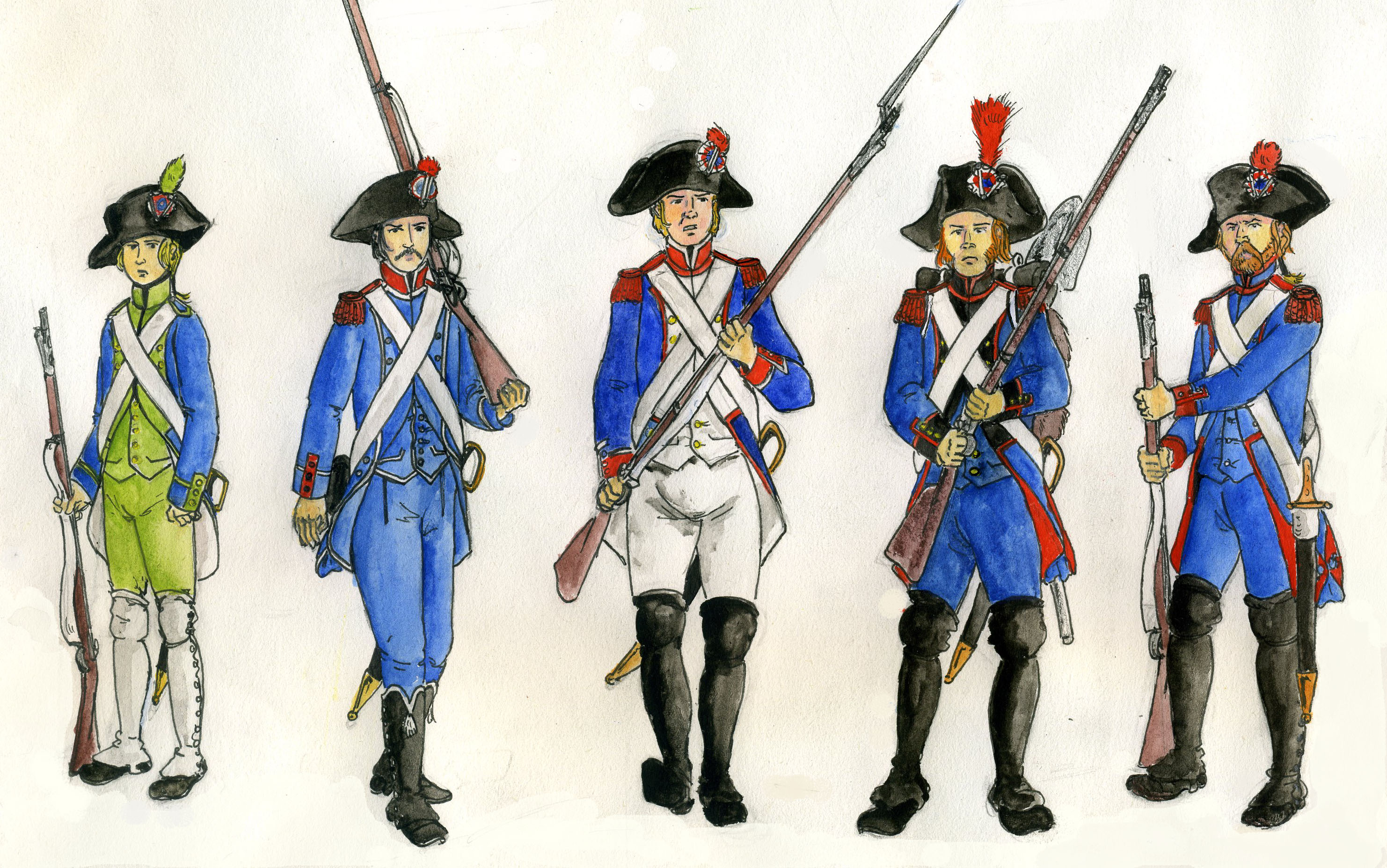 Uniformes français sous la Révolution (Garde-côte, carabinier, fantassin de ligne, sapeur, artilleur)